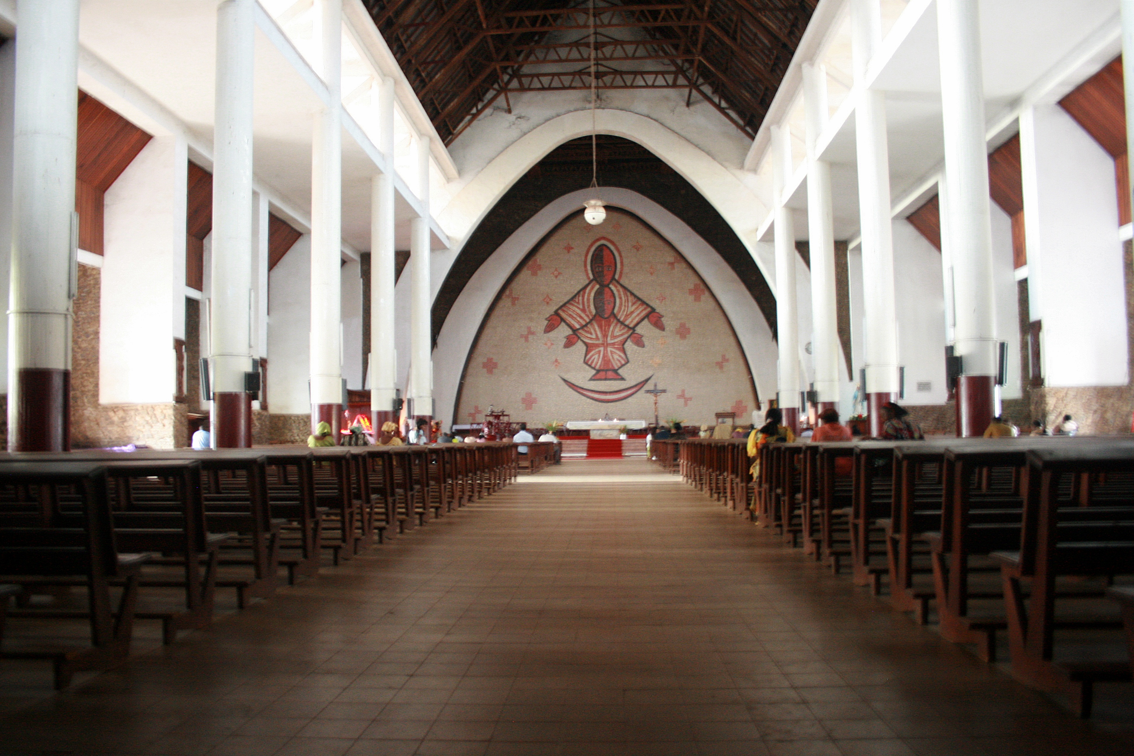 Cathédrale Notre Dame de Victoire de Yaoundé